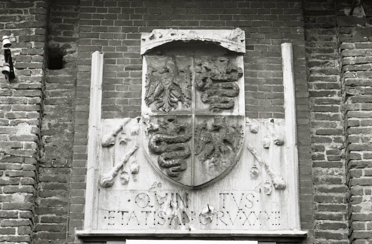 Servizio fotografico : Novara, 1980 / Paolo Monti. - Strisce: 1, Fotogrammi complessivi: 4 : Negativo b/n, gelatina bromuro d'argento/ pellicola ; 35 mm. - ((Sul portanegativi: N[I]K[MA]T FP4 e iscrizione: "Castello di Novara 1/4". - Occasione: Documentazione per la pubblicazione: Vincenti Antonello, "Castelli viscontei e sforzeschi", Milano, Rusconi immagini, 1981. - Fonte: Agenda di Paolo Monti: Nikon Leika 3001-/ Monti 1978 (1978-1982), presso Archivio Paolo Monti. - Fonte: Monografia di Vincenti, Antonello: Castelli viscontei e sforzeschi, Milano, Rusconi immagini (1981)